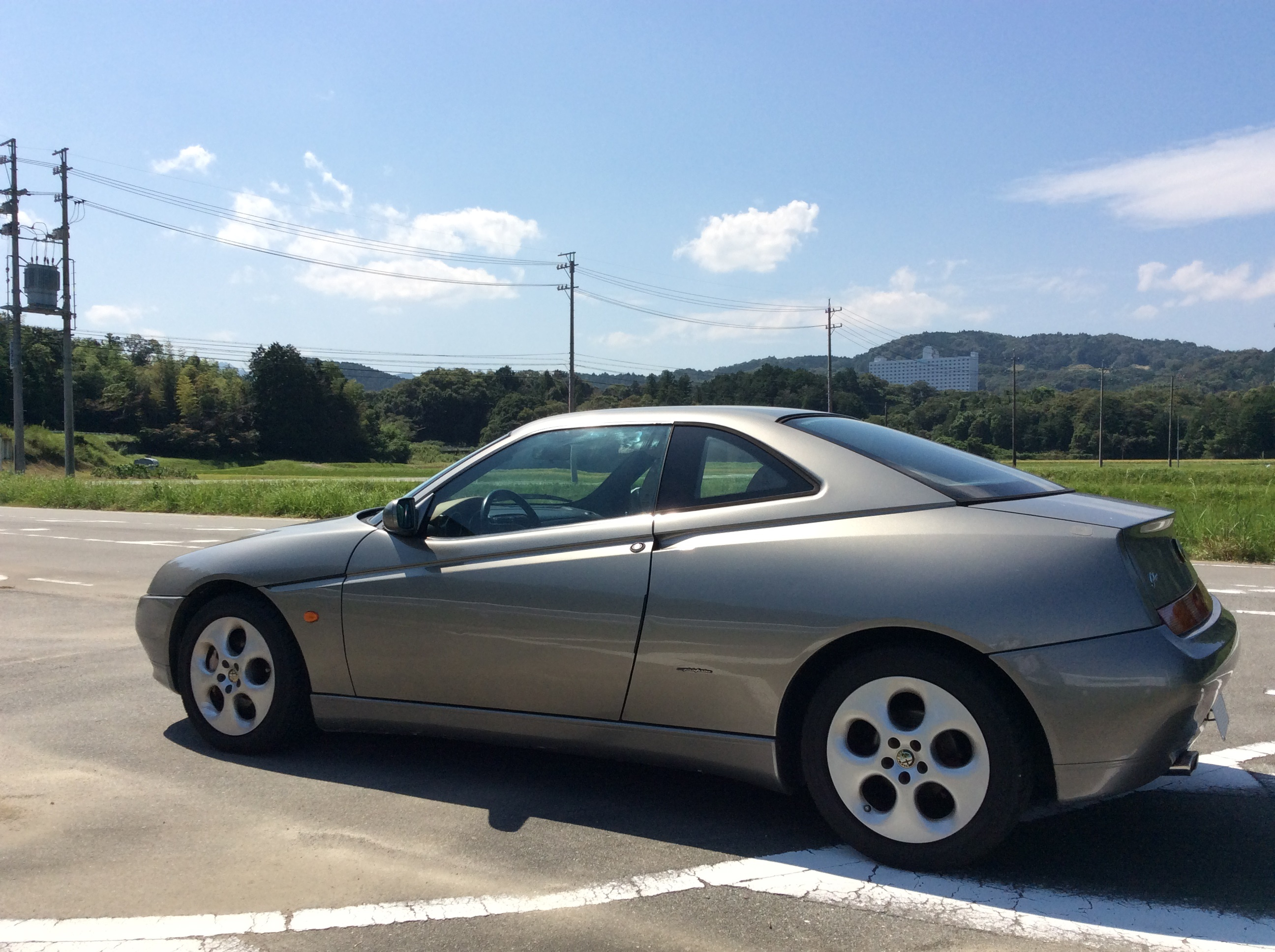 AlfaRomeo GTV phase 1